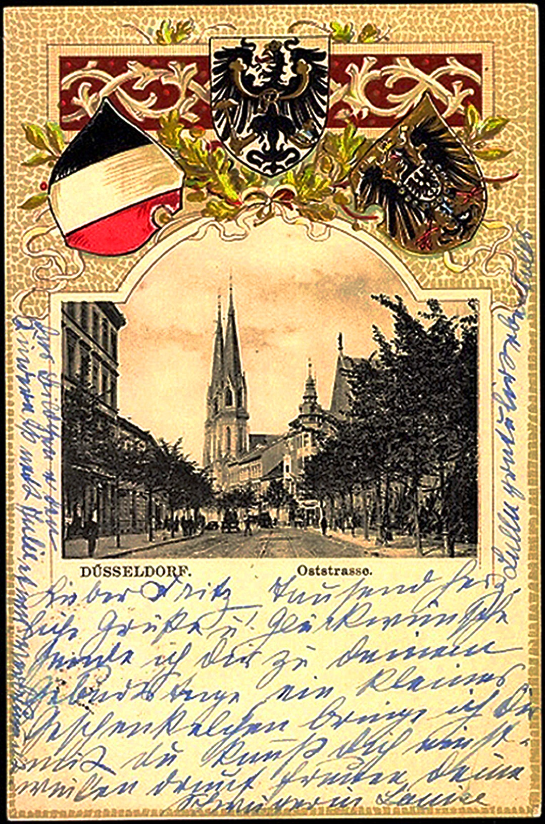 Präge Wappen Ak Düsseldorf, Blick in die Oststraße, gelaufen 1901, Ecken bestoßen, sonst guter Zustand-Vorderseite.jpg